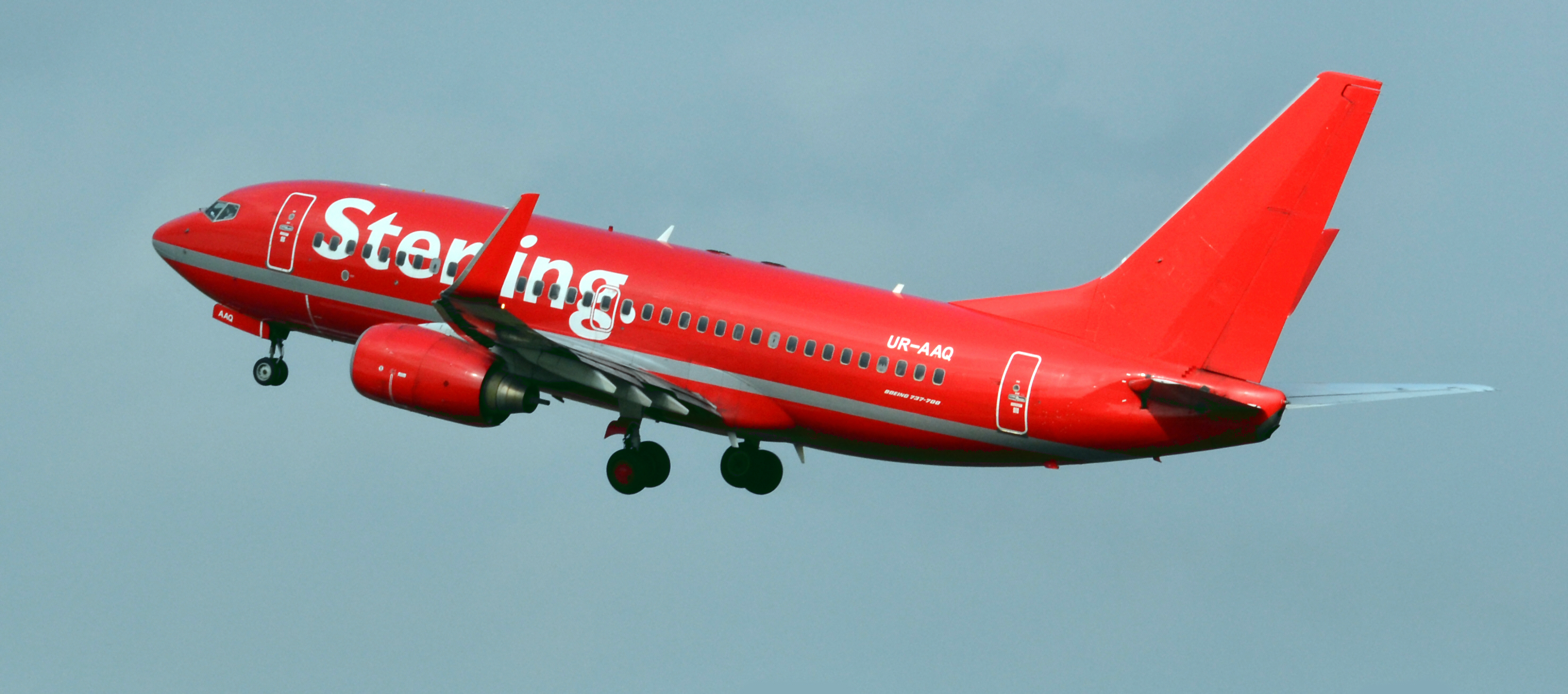 Boeing 737-700 (UR-AAQ) ex OY-MRH in Rot mit dem Sterling Schriftzug ohne .eu Endung